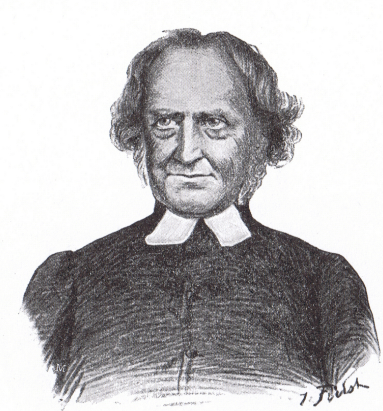 Claus Harms (1778-1855), lutherischer Pfarrer in Kiel. Er gab Impulse für das Neuluthertum des 19. Jahrhunderts und war profilierter Pastoraltheologe, Zeichnung von Julius Fürst um 1895